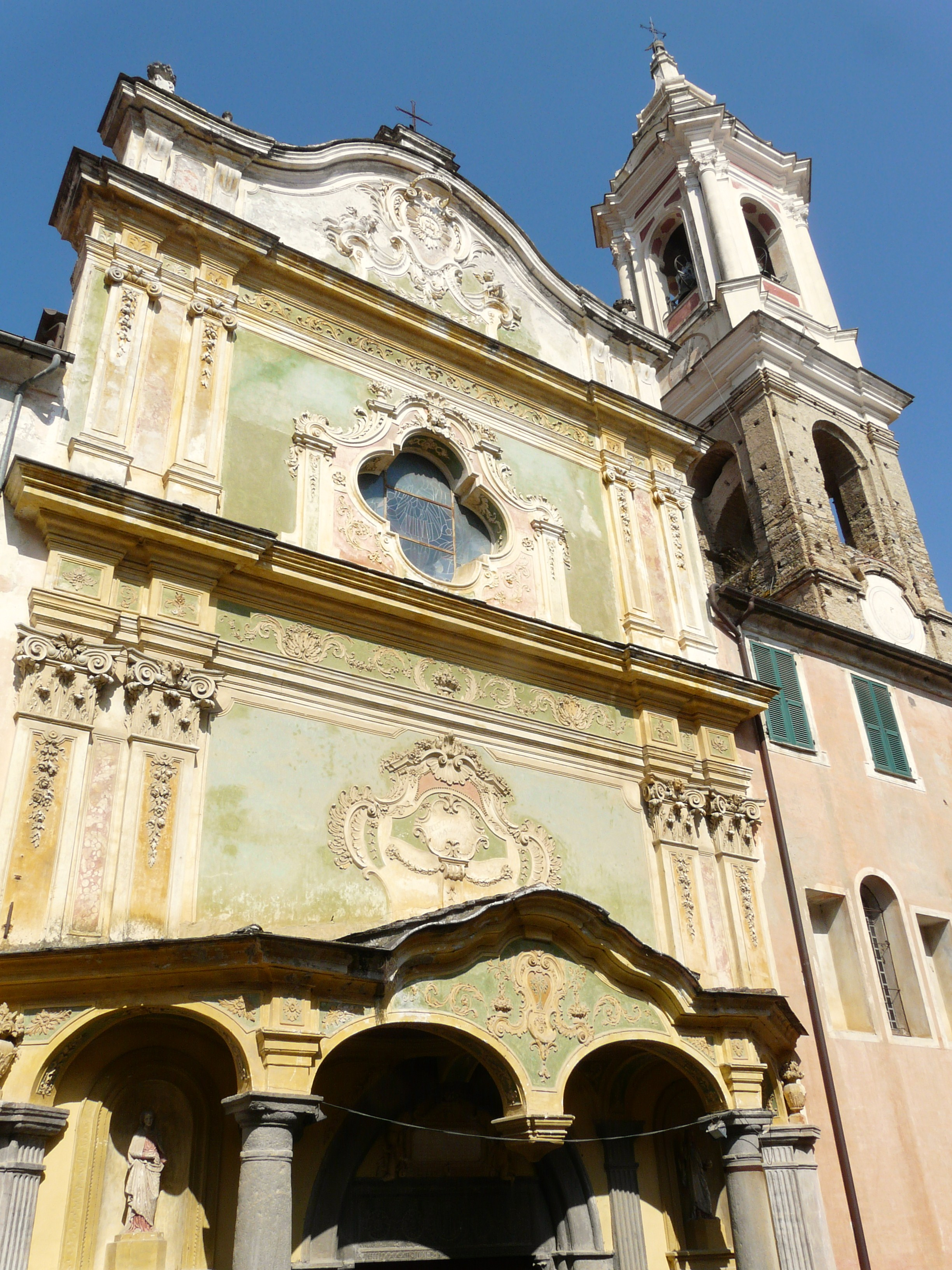 Chiesa di San Tommaso, Dolcedo, Liguria, Italia